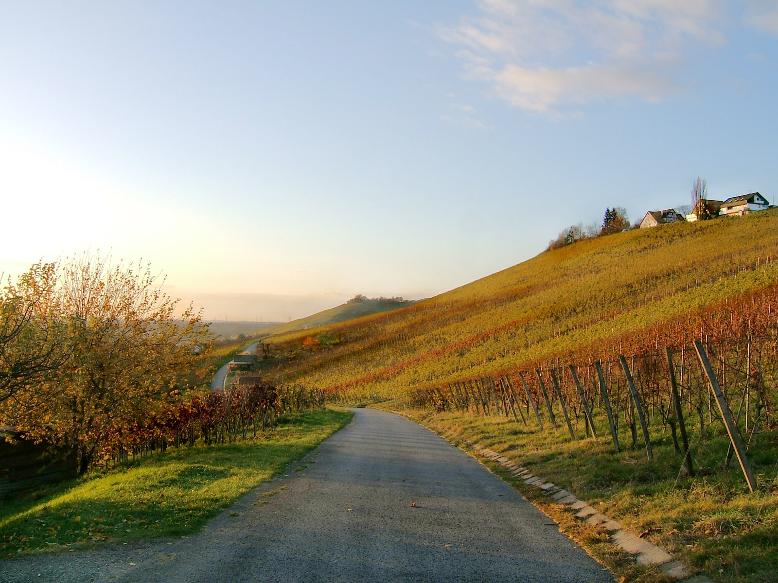 Remshalden, Weinberge, Blick nach Westen